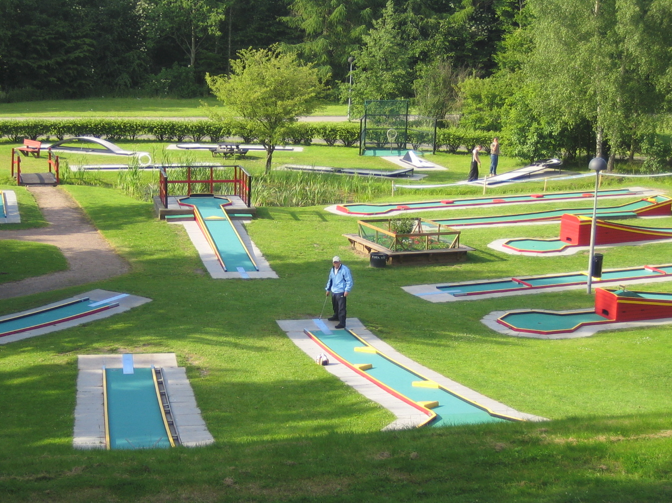 Minigolfbanan i Bulltoftaparken i Malmö. Bilden tagen av mig själv 28 juni 2005.